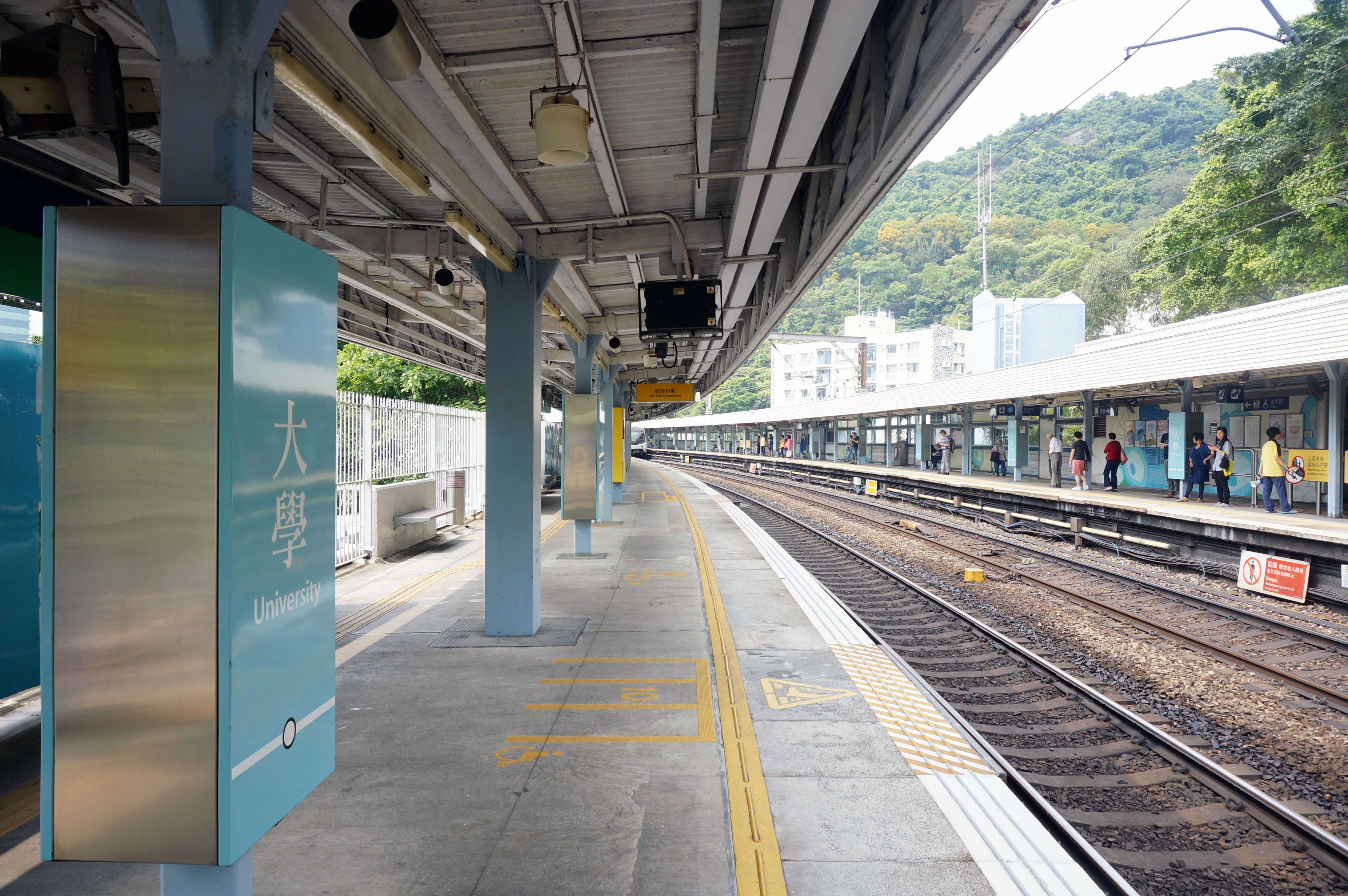 港鐵大學站月台